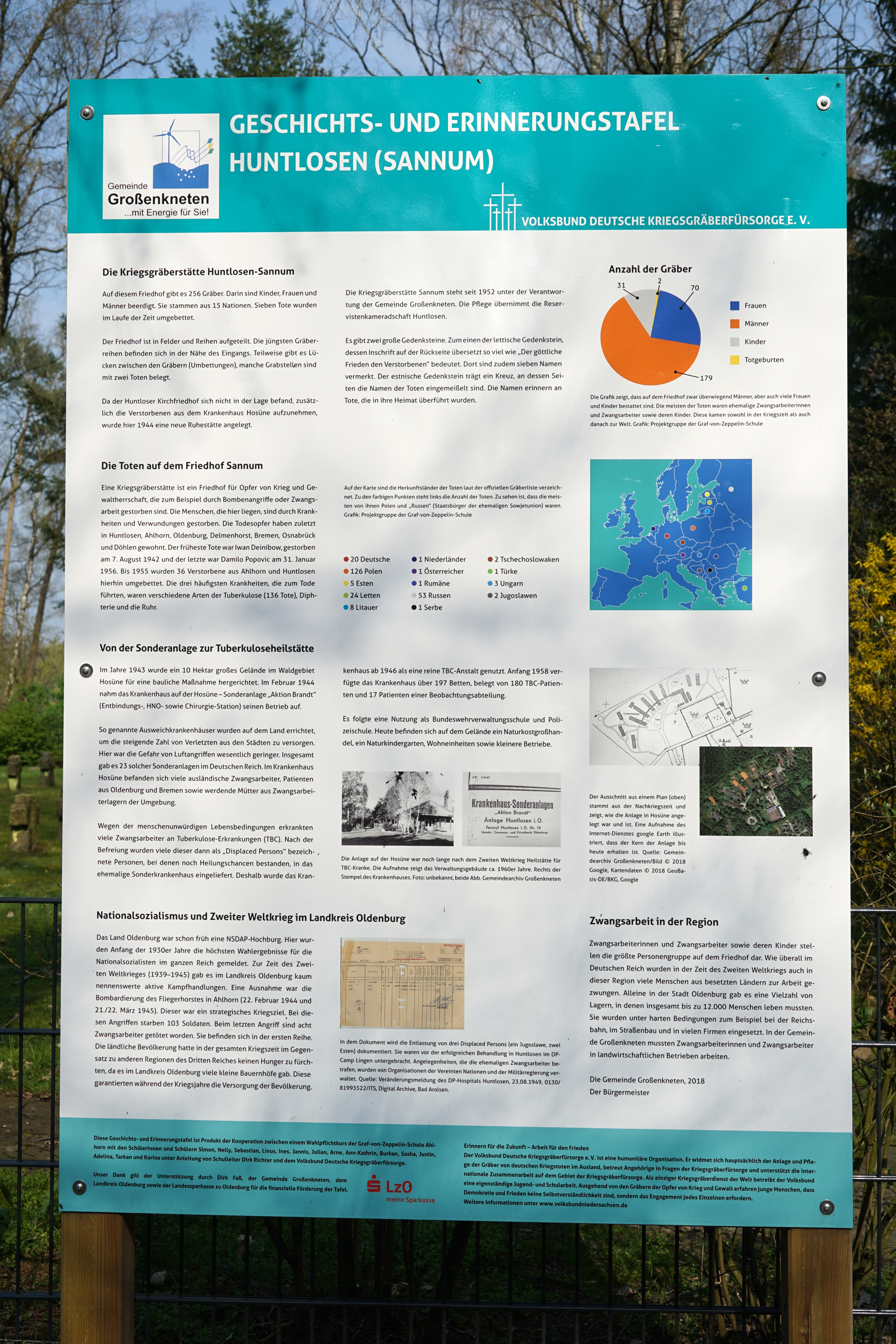 Kriegsgräberstätte Sannum Erinnerungstafel im April 2019